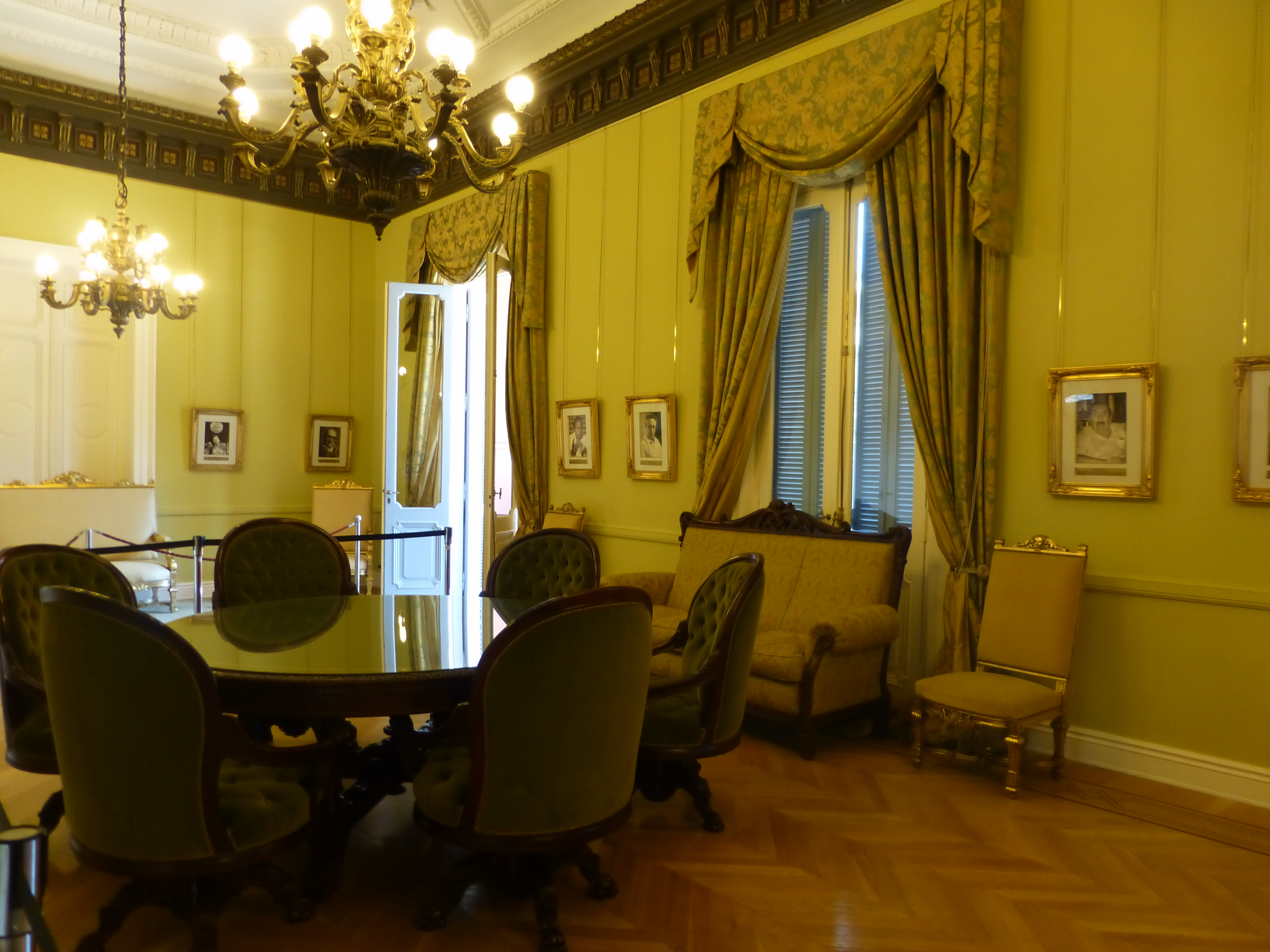 Casa de Gobierno